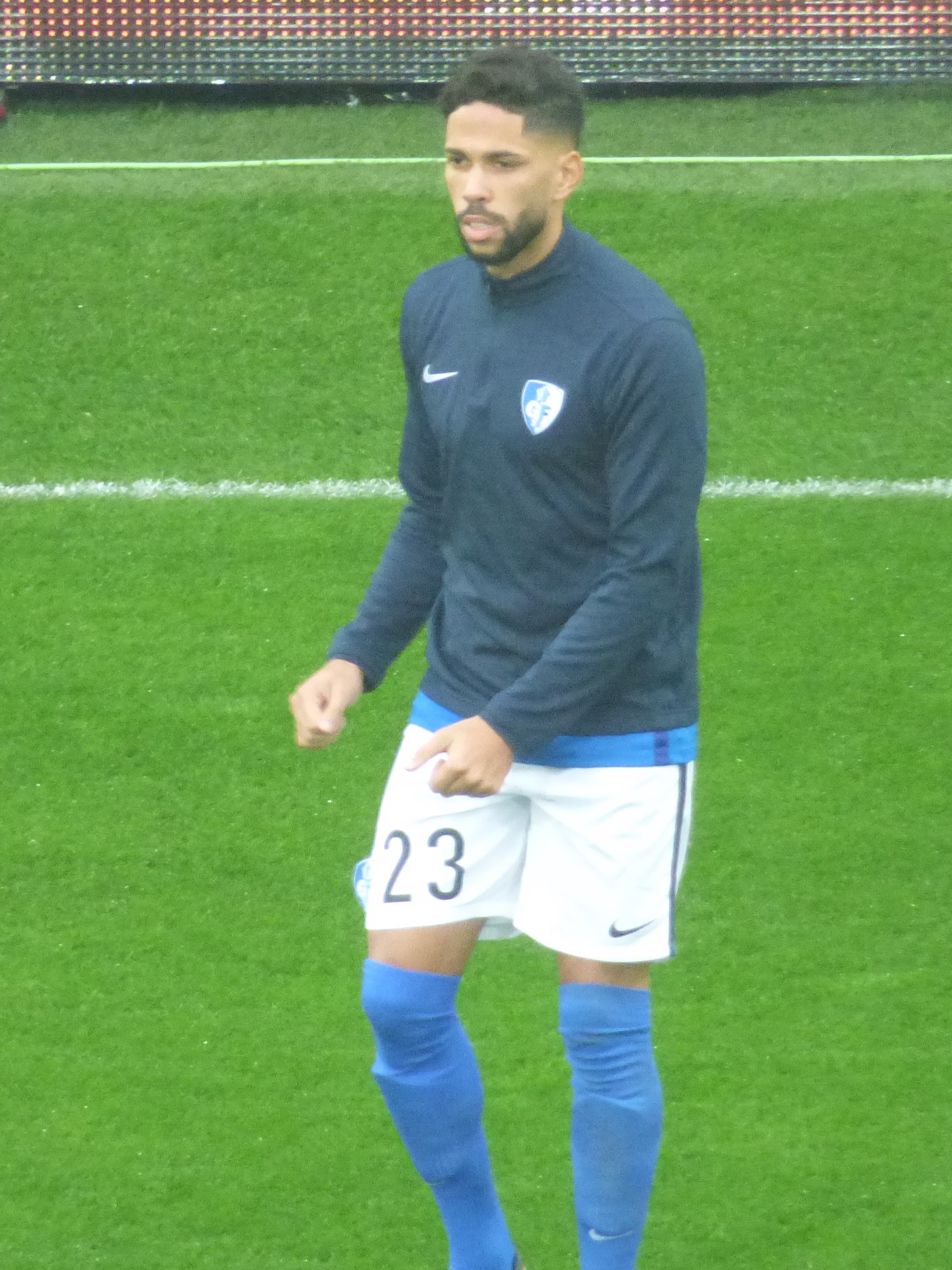 Jérôme Mombris avant le match RC Lens / Grenoble Foot 38, le 24 novembre 2018, comptant pour la quinzième journée du championnat de France de football de Ligue 2 2018-2019, au Stade Bollaert-Delelis.